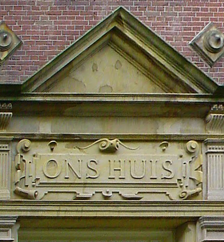 Ons Huis Rozenstraat Amsterdam